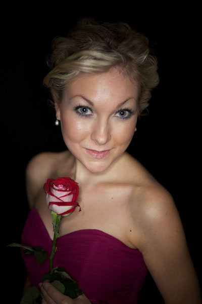 Christina Johnston